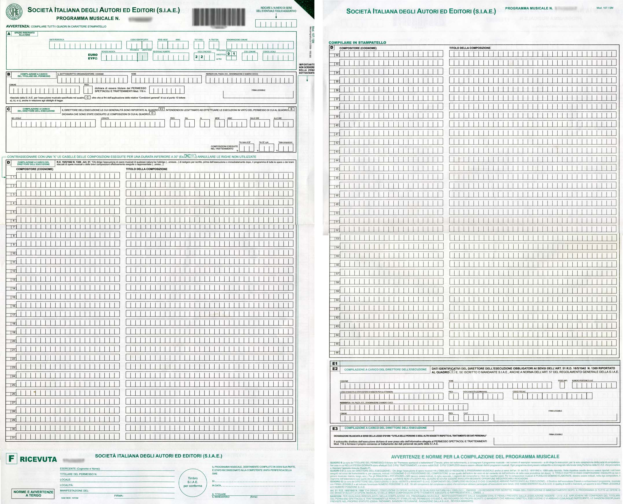 Borderò SIAE verde (bollettino delle programmazione musicale)